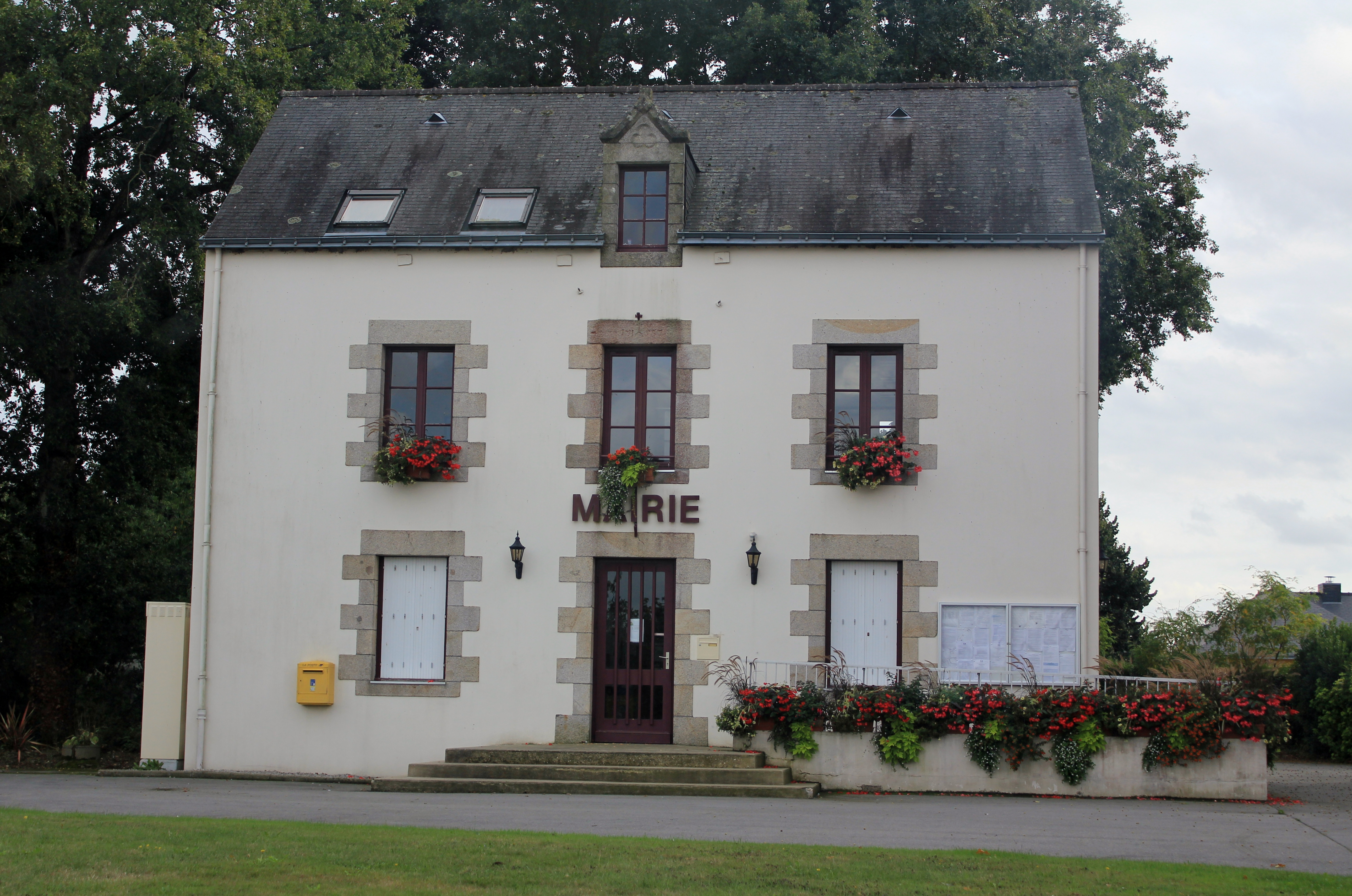 La Croix-Helléan, marie